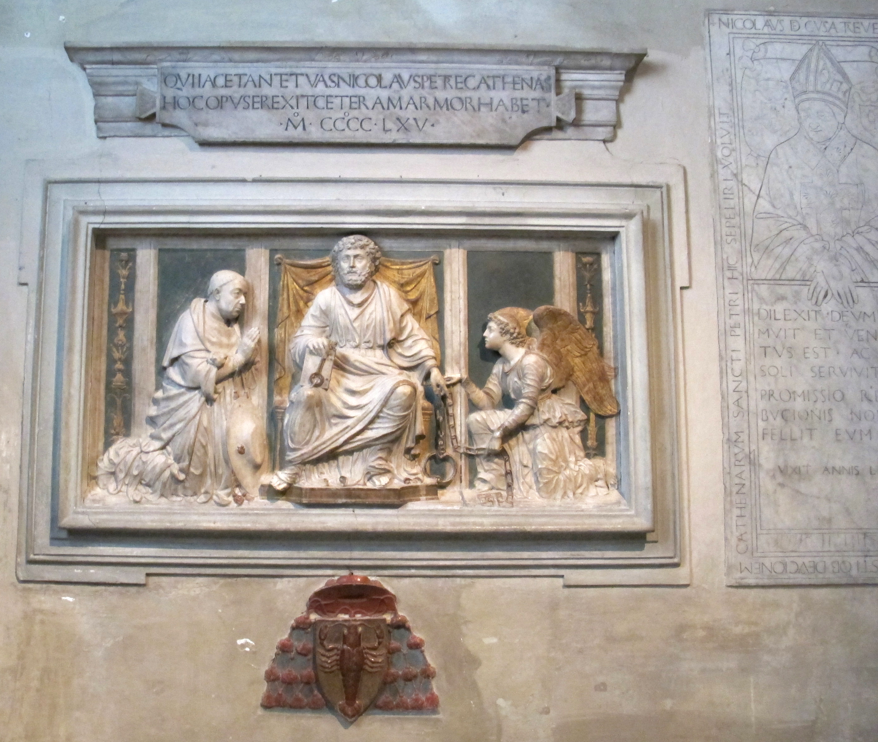 Andrea bregno (attr.), san pietro tra cardinale niccolò da cusa e l'angelo libertaore (1464 ca.)